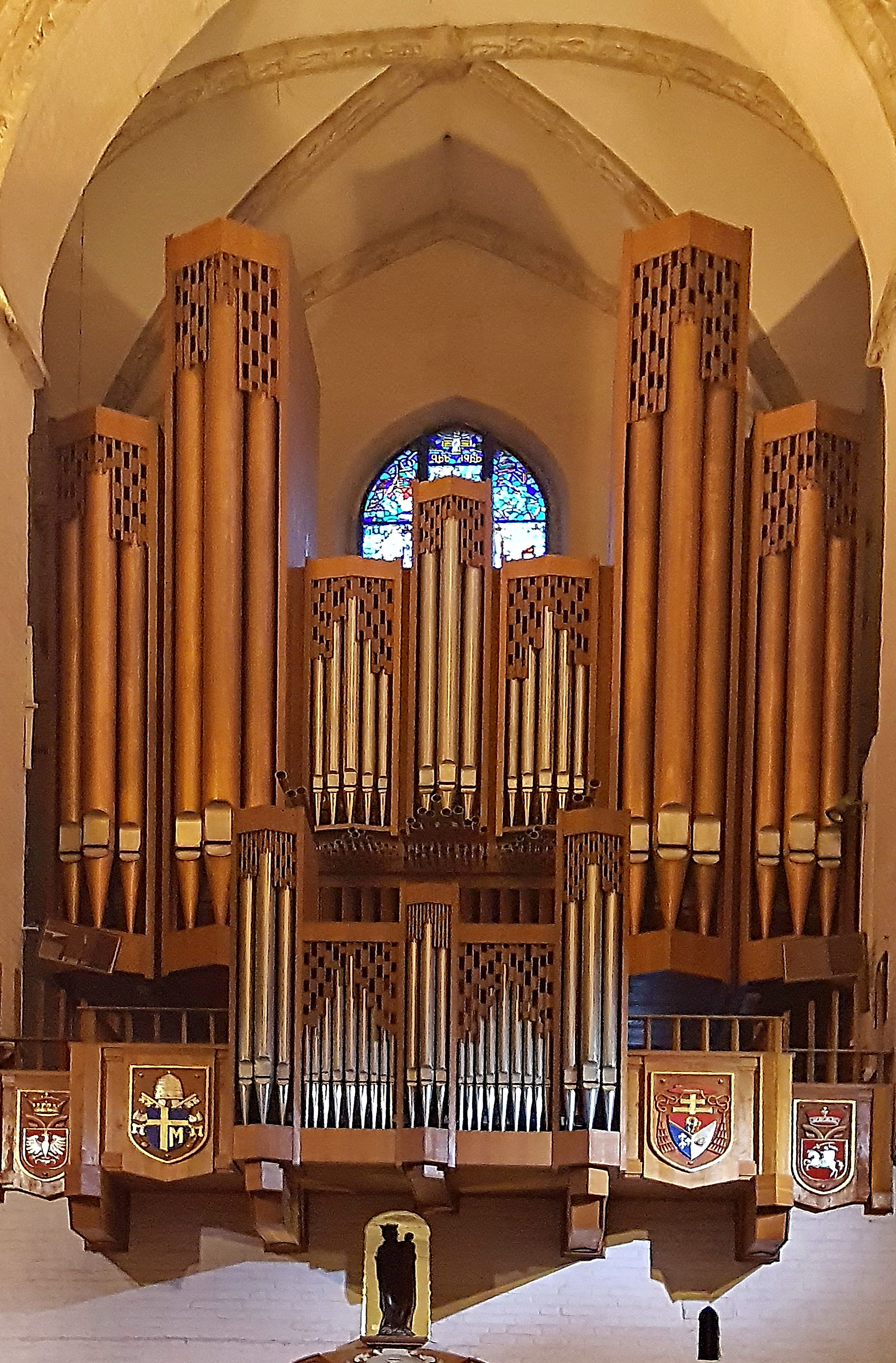 Organy katedralne w Bazylice prymasowskiej Wniebowzięcia Najświętszej Maryi Panny w Gnieźnie